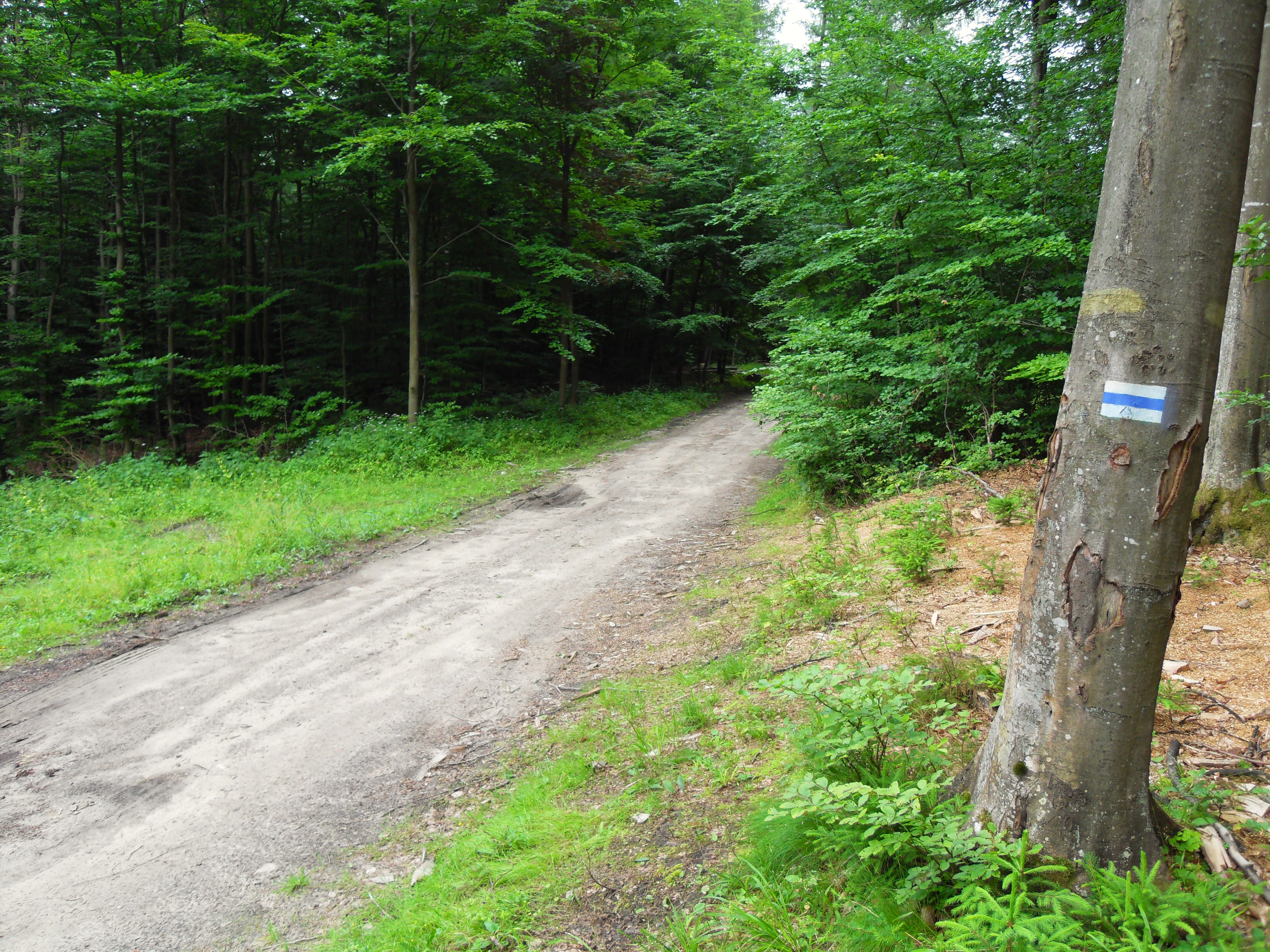 Gdańsk Brętowo - TPK, Lasy Oliwskie - szlak turystyczny kartuski (niebieski).